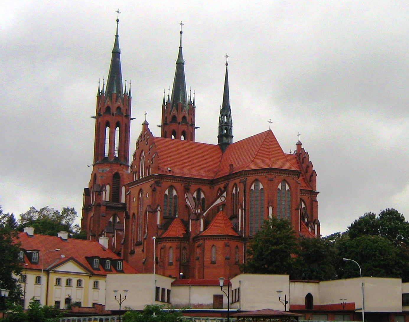 Katedra Wniebowzięcia Najświętszej Marii Panny w Białymstoku - widok od al. J. Piłsudskiego / ul. Kościelnej